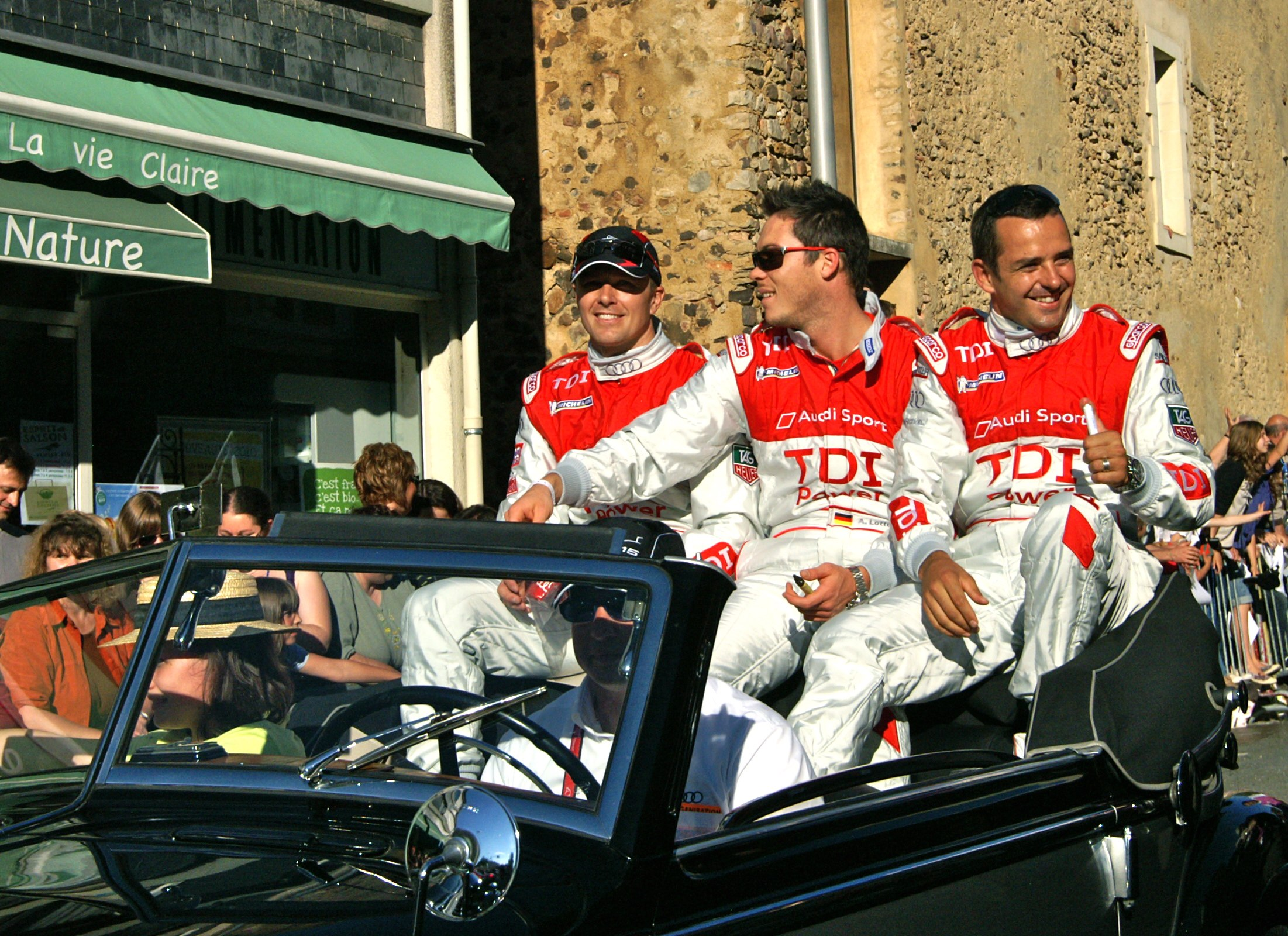 Marcel Fässler, André Lotterer and Benoît Tréluyer, Le Mans 2010, Drivers' Parade